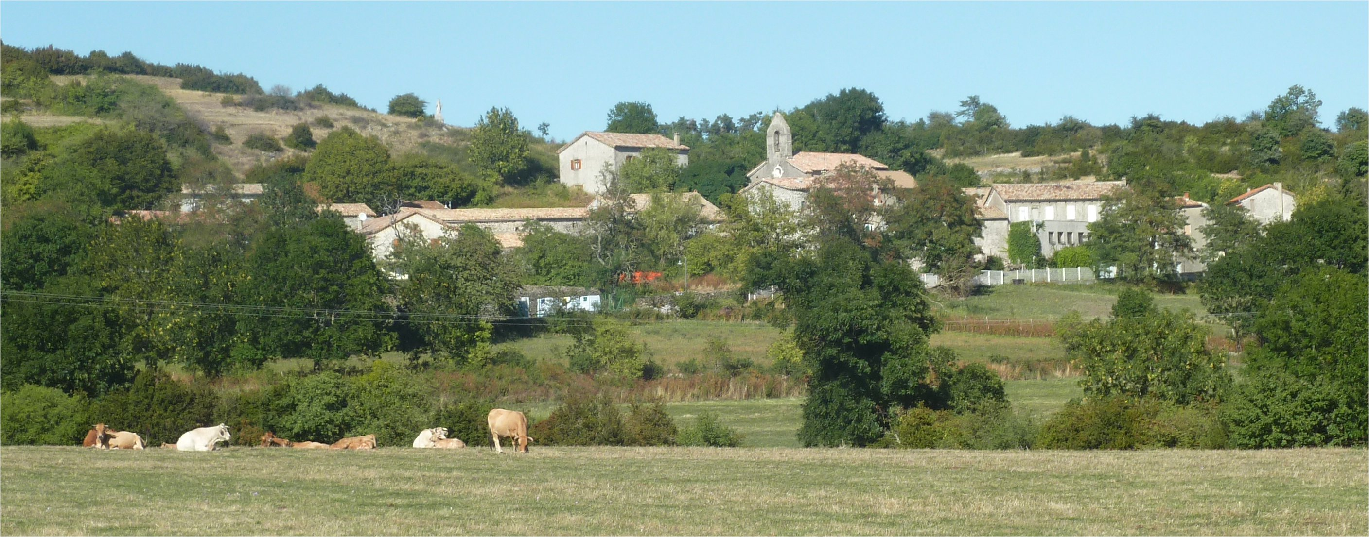 Vue du village de Freyssenet Plateau du Coiron Ardèche